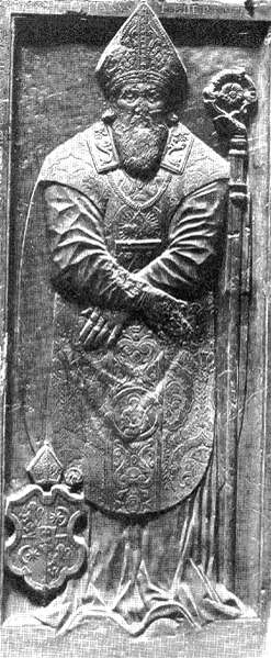 Fehérkövi István Archbishop of Esztergom (1590), Hungary.